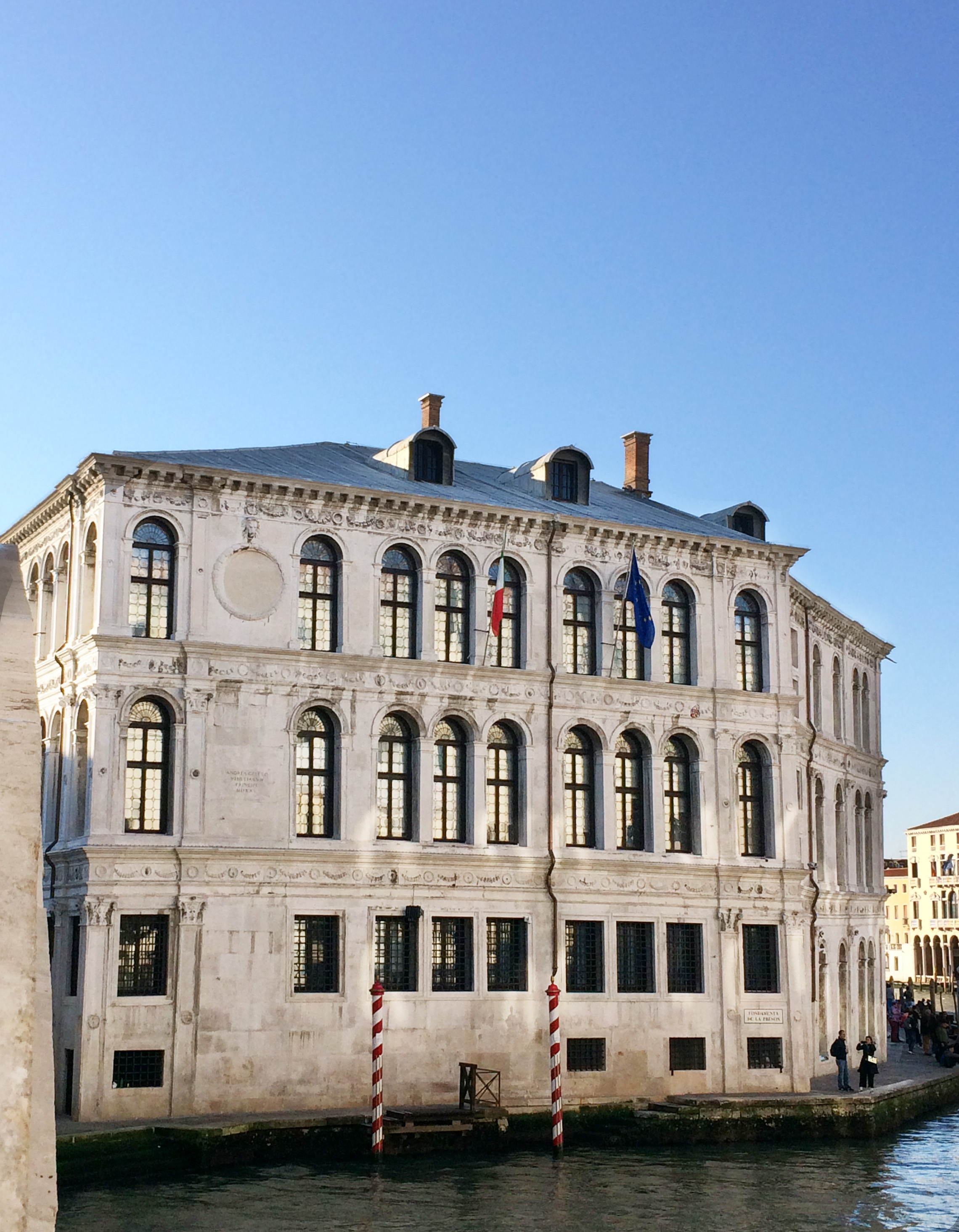 Palazzo dei Camerlenghi, Canal Grande. Venice